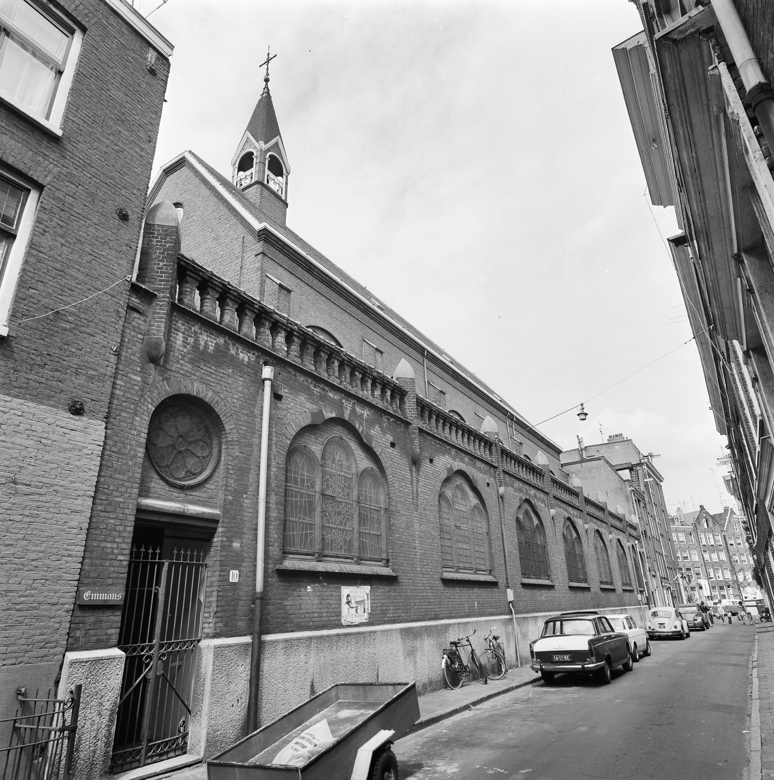 voorgevel